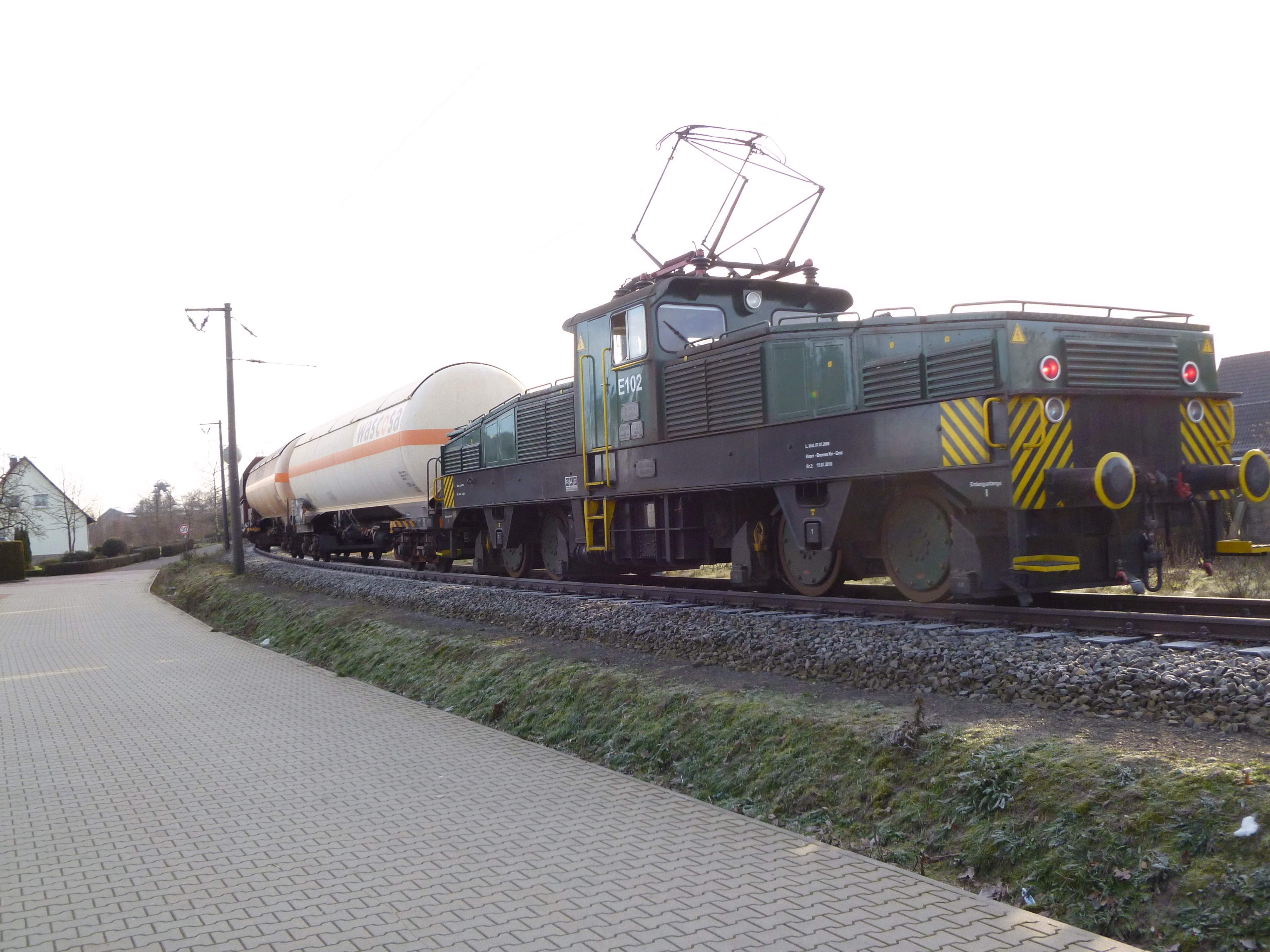 Zechenbahnlok E-102 des Bergwerkes Ibbenbüren auf der Zechenbahn in der Nähe des Mühlenweg- Bahnüberganges.